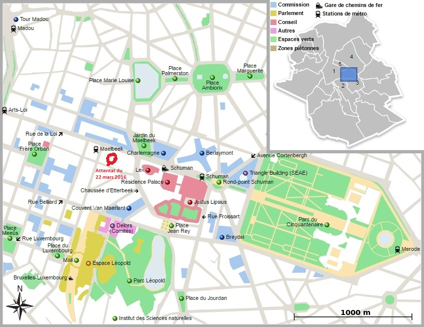 Carte du quartier européen de Bruxelles